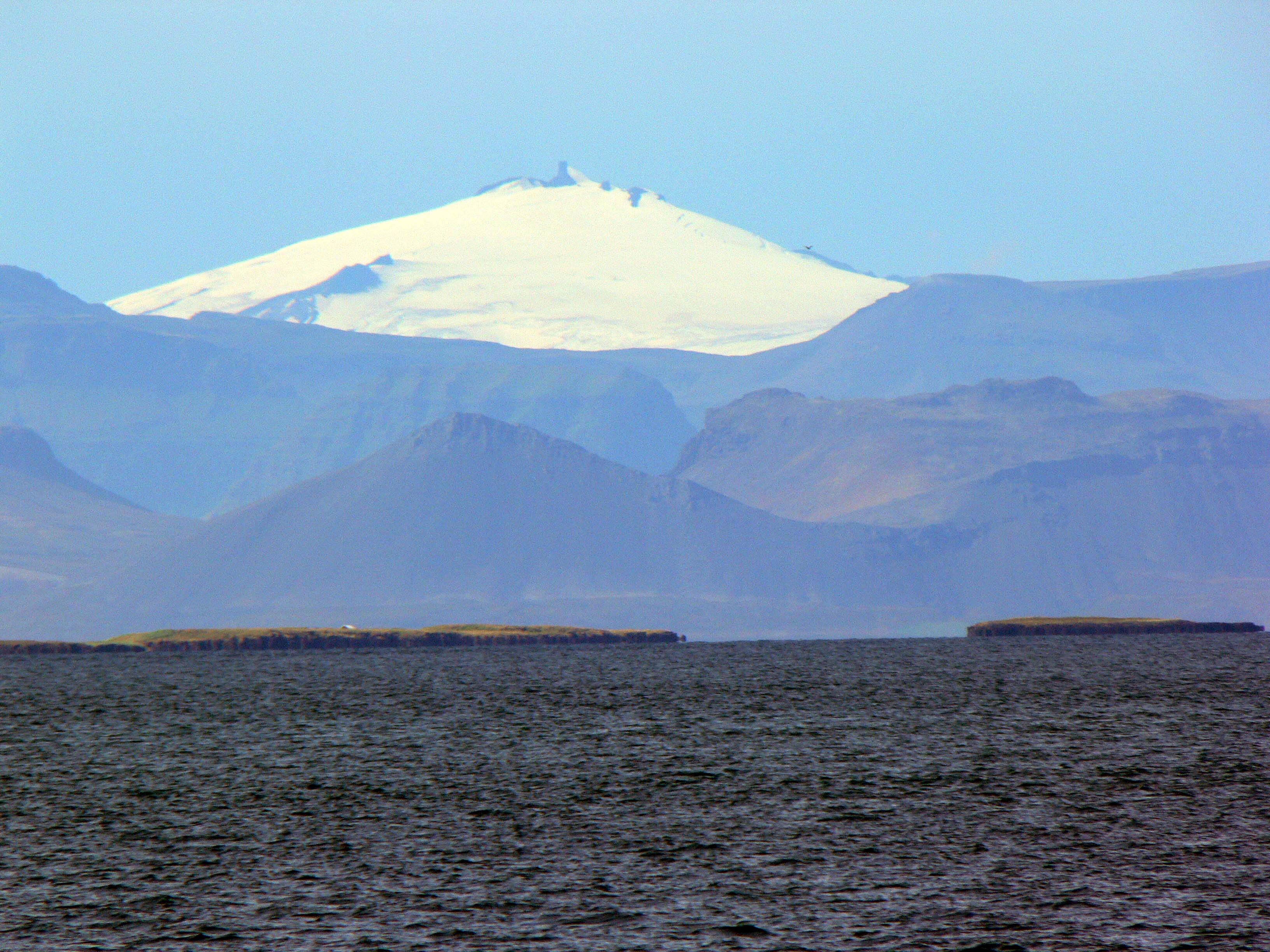 Der Snæfellsjökull vom Breiðafjörður aus gesehen.